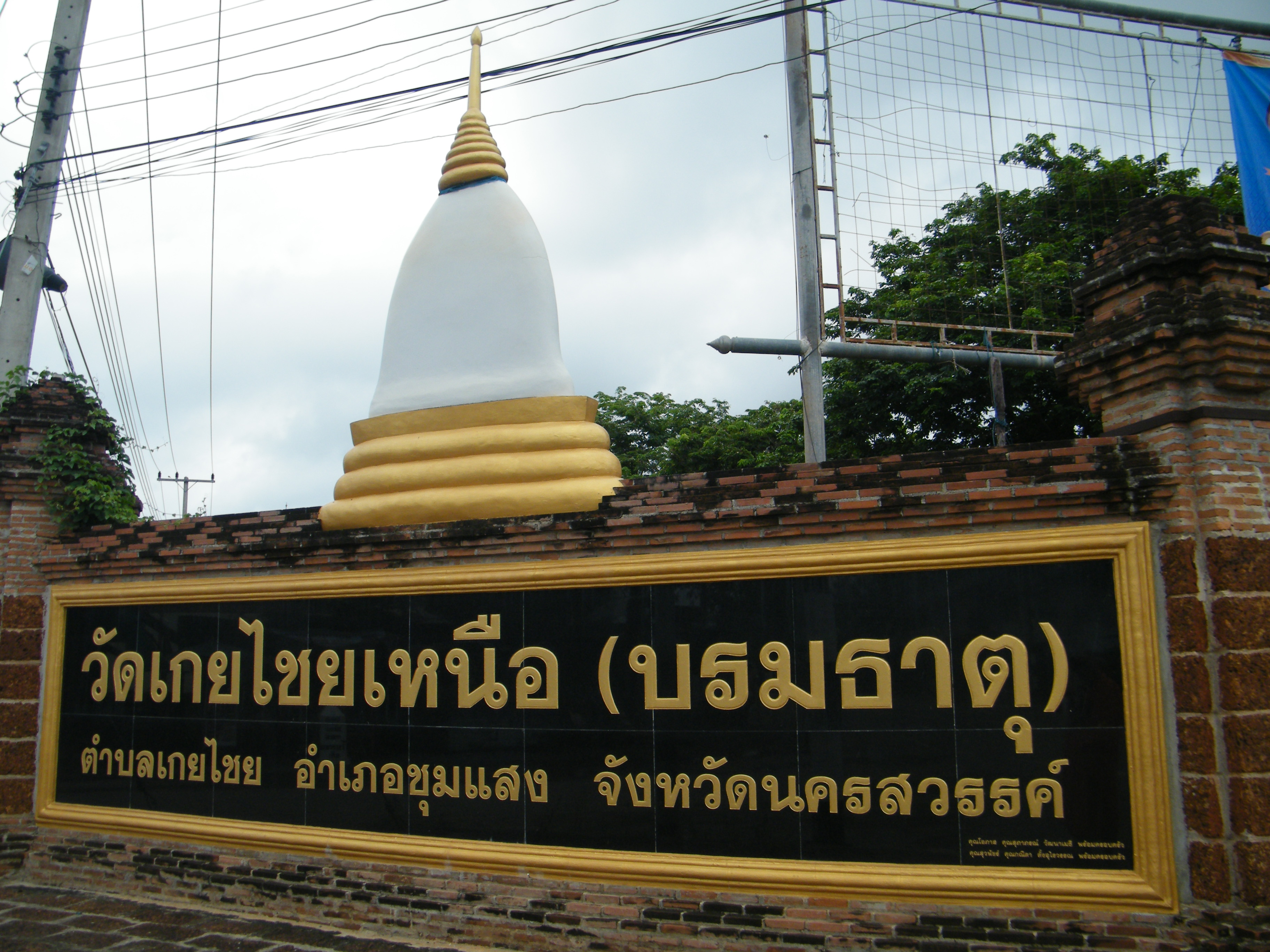 พระบรมธาตุเจดีย์